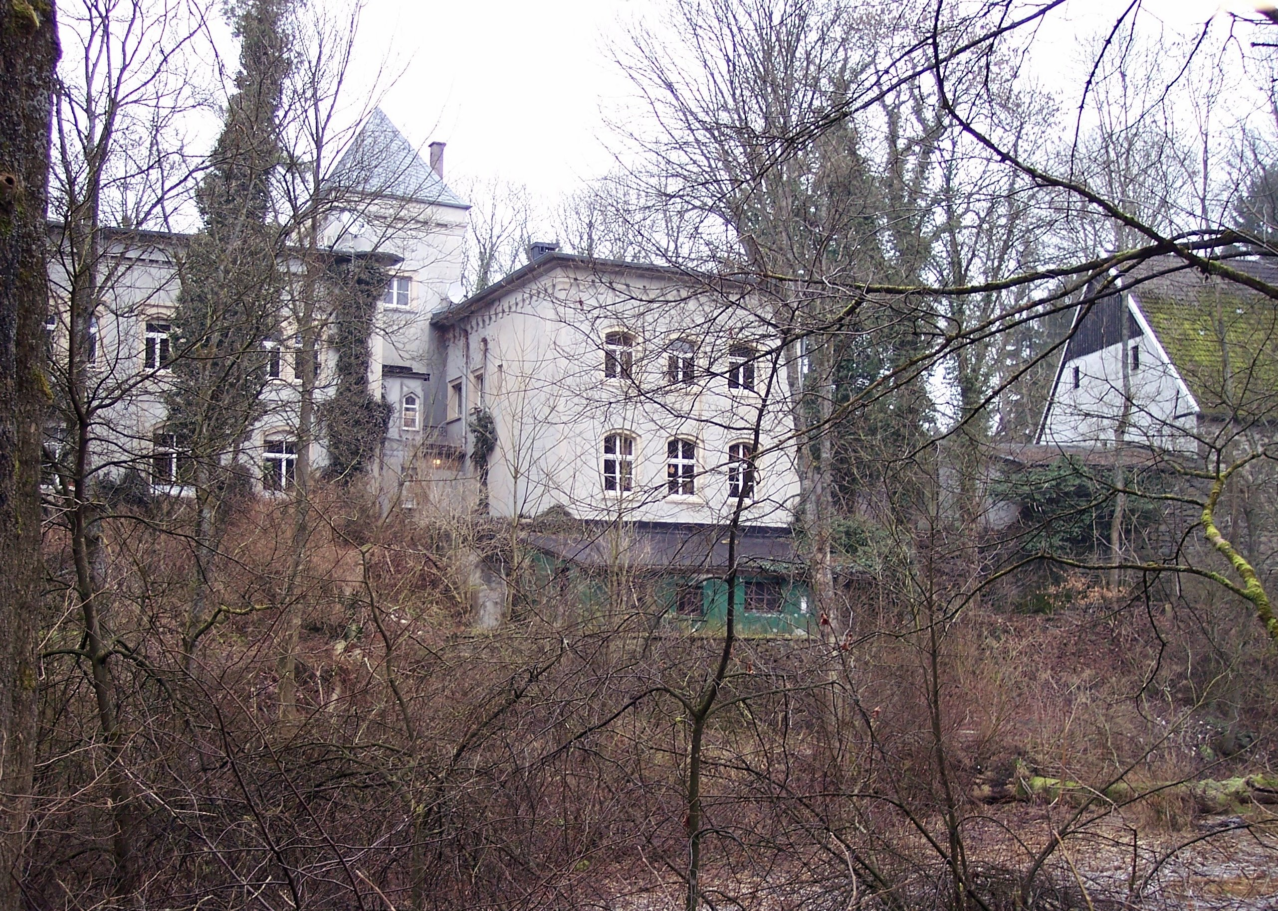 Lüdenscheid, Schloss Oedenthal, Rück- oder Gartenseite